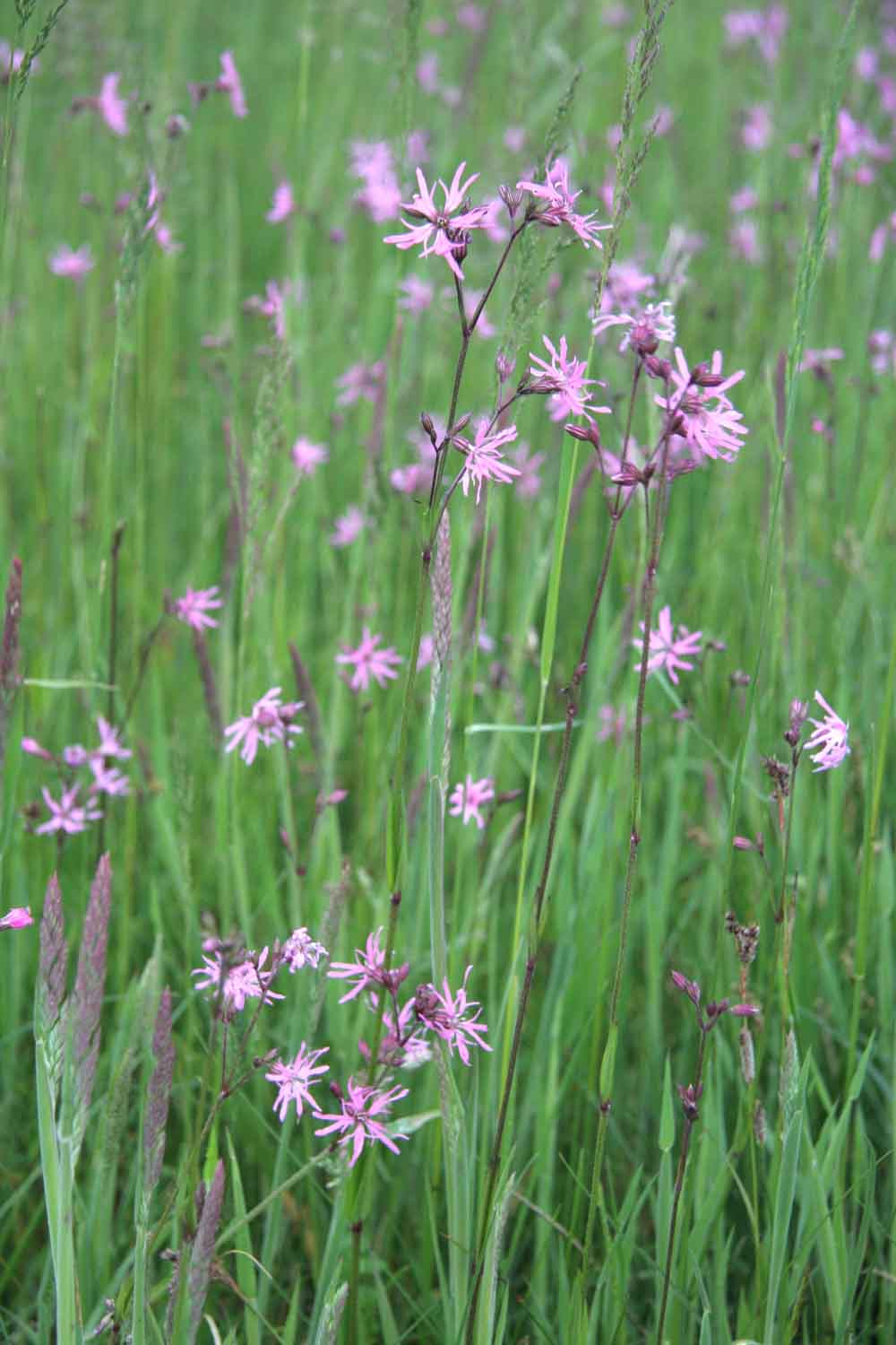 Lycnis flos-cuculi autor:Prazak